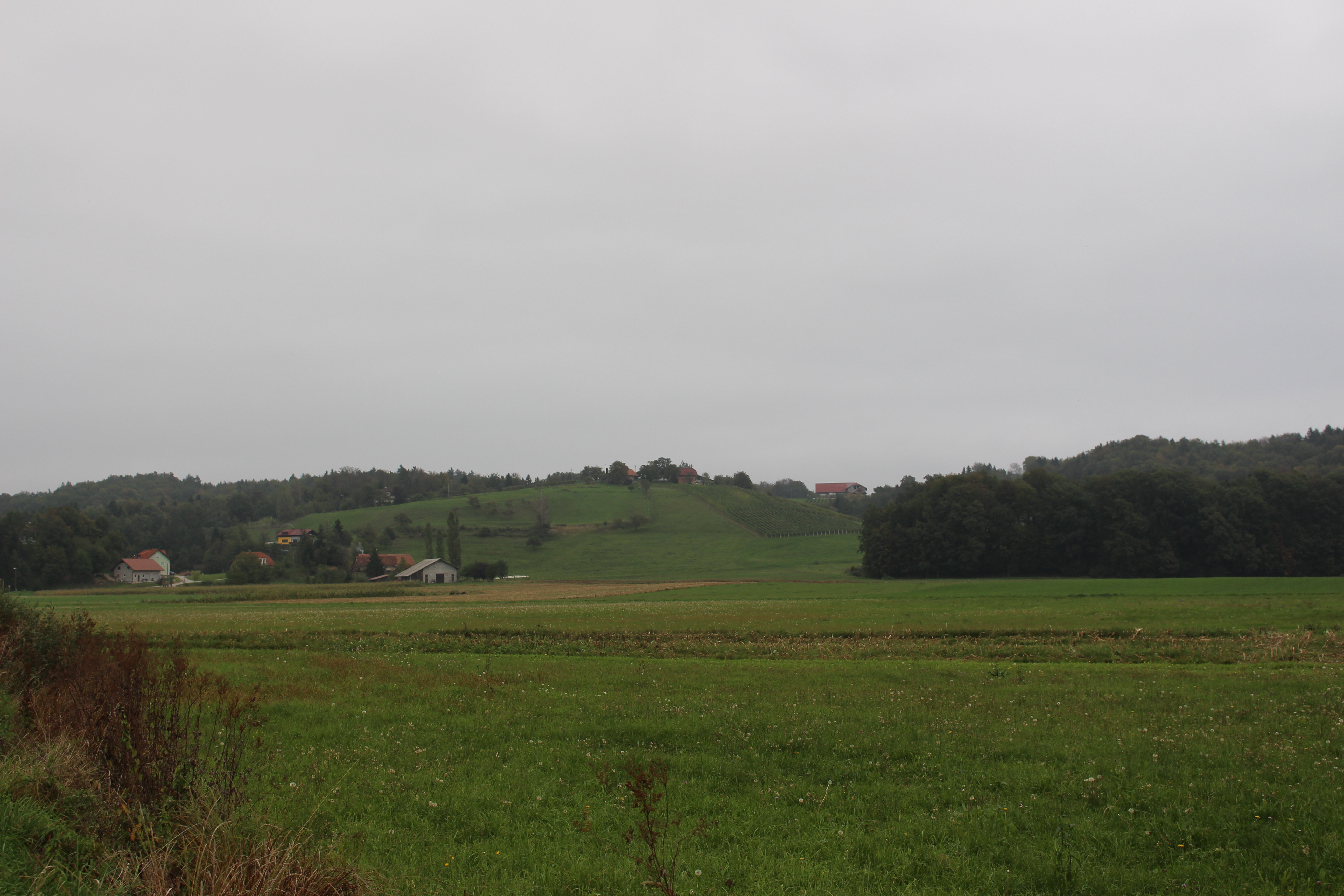 Словения, вид на окрестности - за рестораном "Marché"